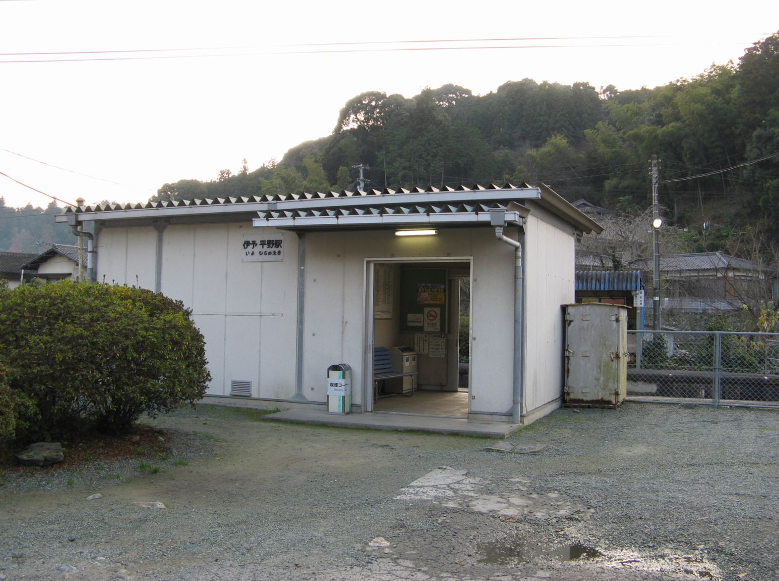 予讃線伊予平野駅 駅舎